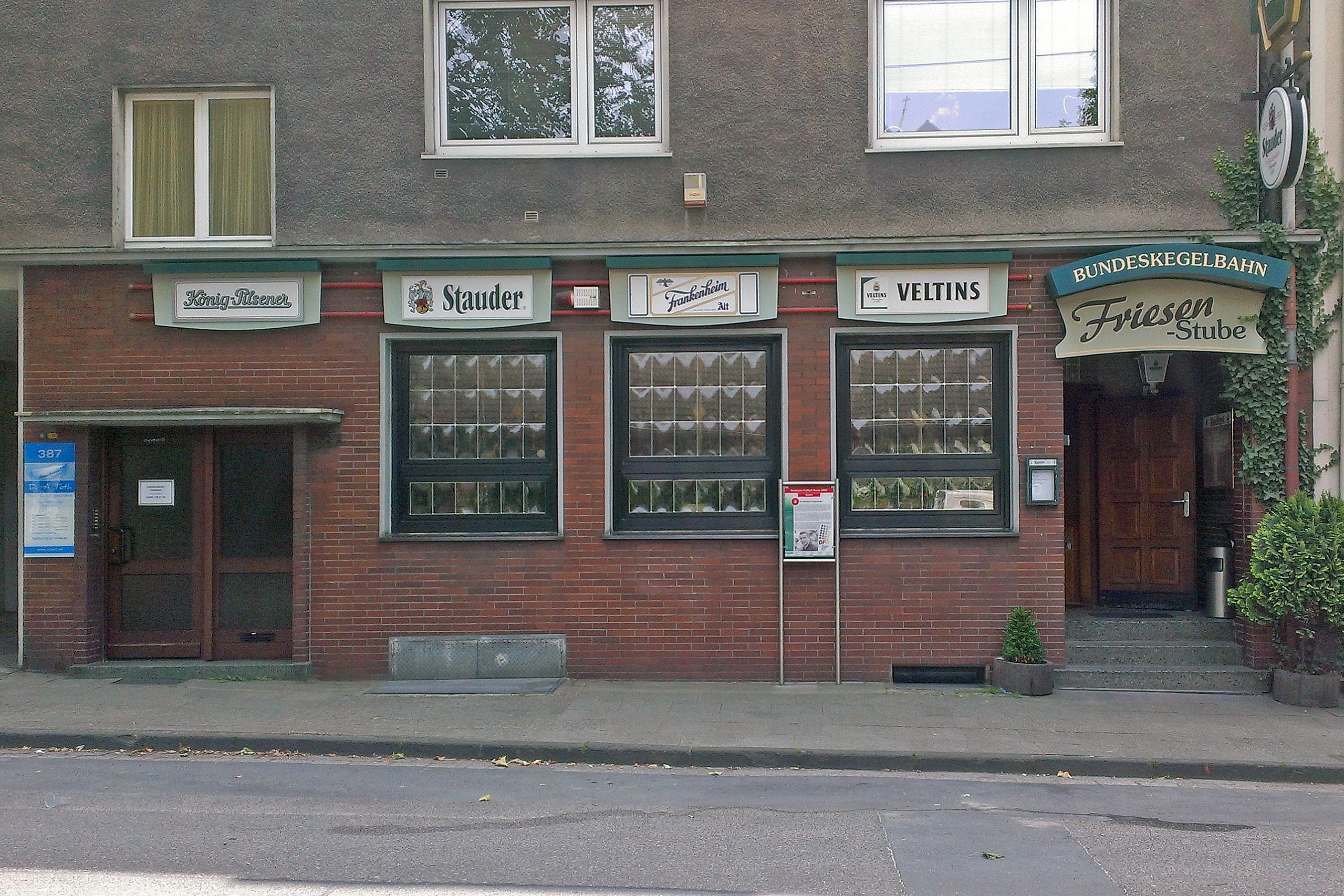 Friesenstube, Gaststätte in Essen-Frohnhausen, gehört zur Deutschen Fußball Route NRW. Helmut Rahn war hier zu Lebzeiten ein gerngesehener Stammgast.